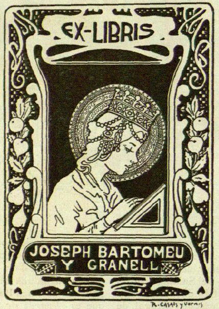 Exlibris de R. Casals i Vernis (1860-1920), per a Josep Bartomeu i Granell (1904)